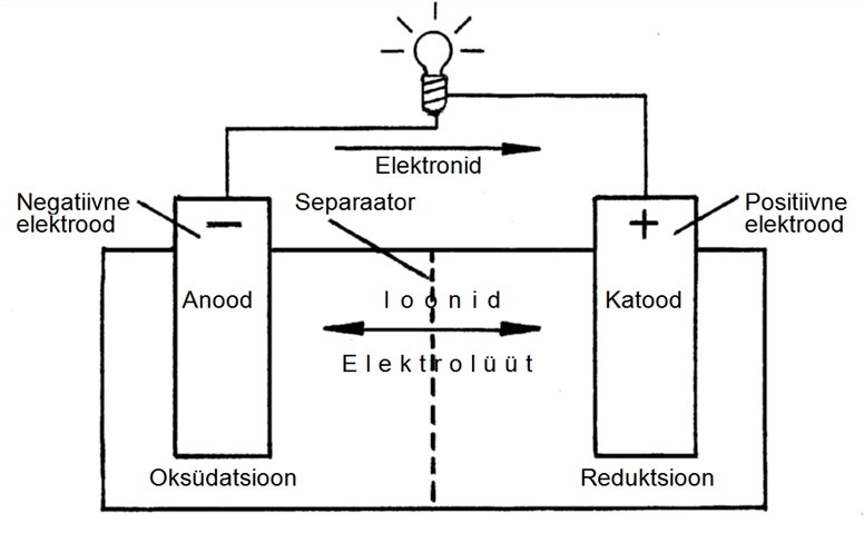 Keemilise vooluallika tööpõhimõte